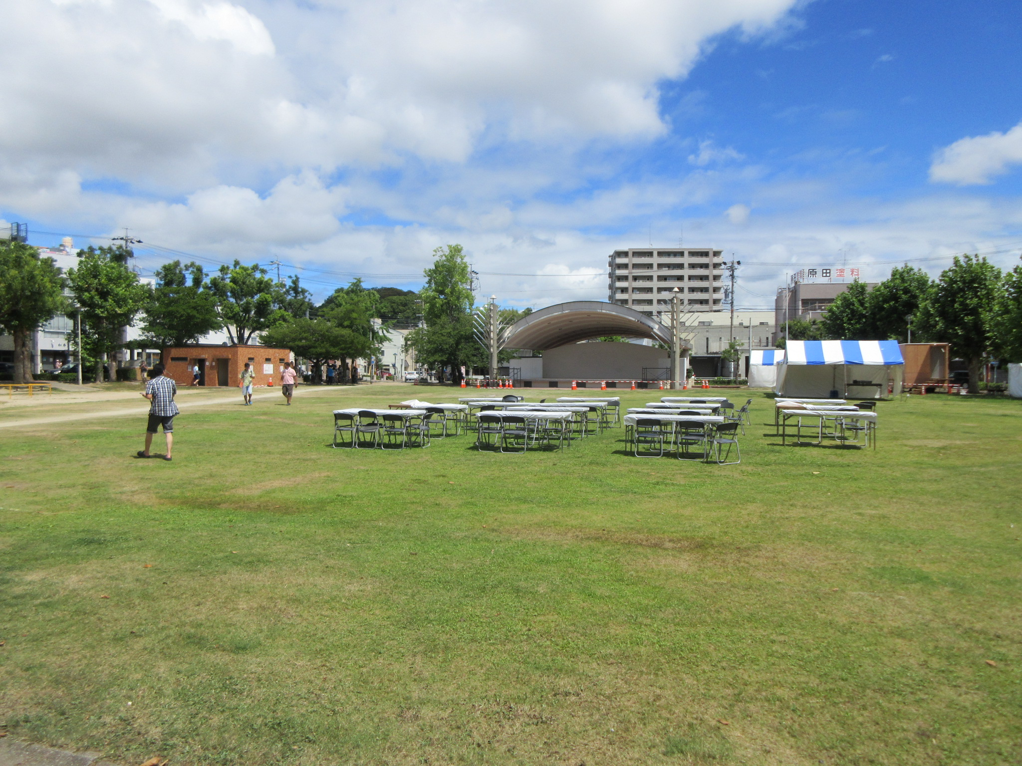 籠田公園（岡崎市籠田町）